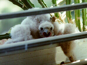 Falco צולם בhe:באר שבע ב1995 או 1996.